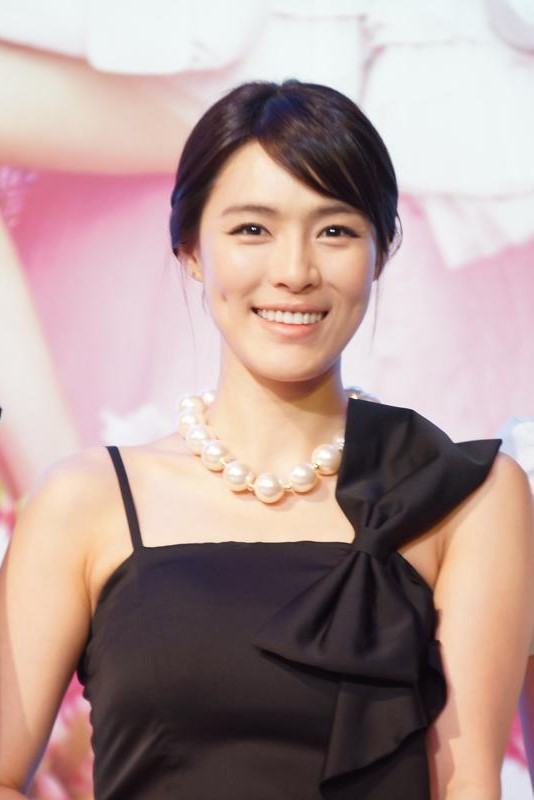 120519 사만사 타바사 이벤트